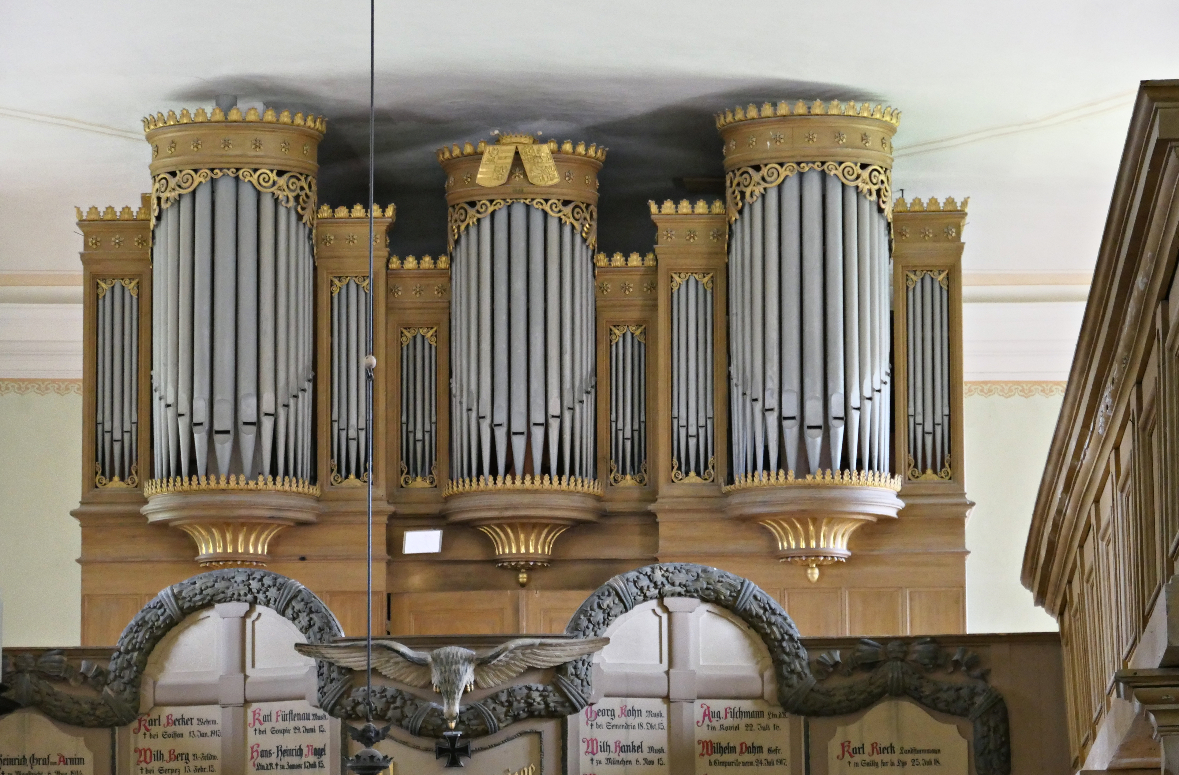 Orgel in der Marienkirche auf dem Berge, Boitzenburg in der Uckermark, Brandenburg, Deutschland